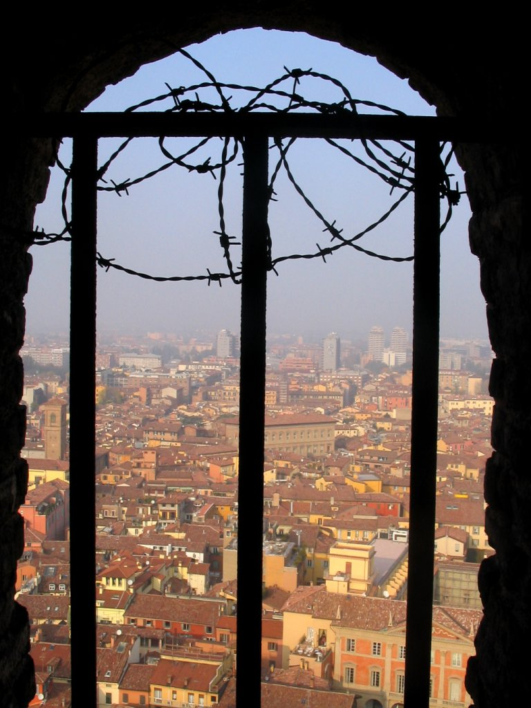 Vista, Bologna, Italy.